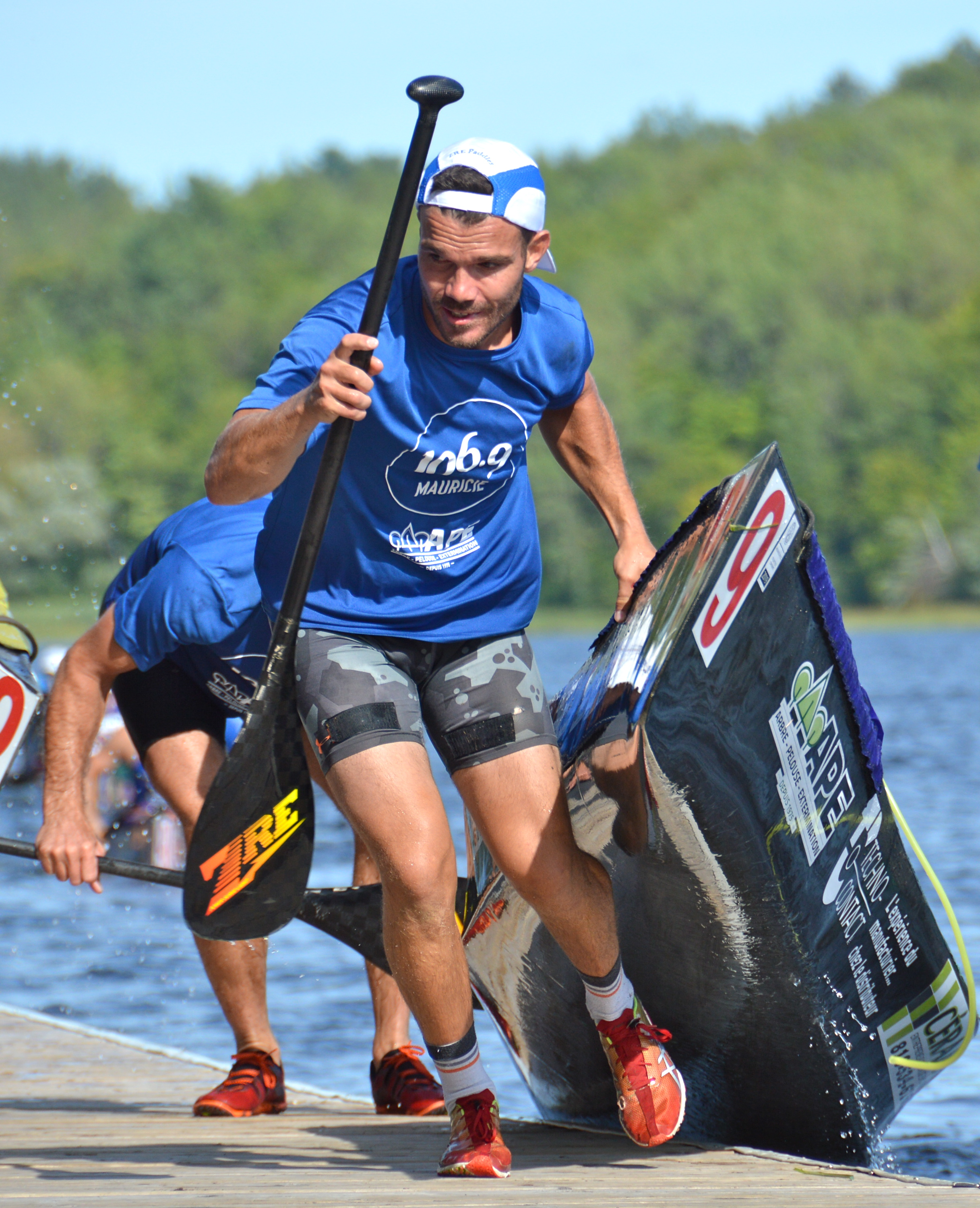 L'équipe de tête (canot 9), composée de Jimmy Pellerin et Steve Lajoie, au début du portage à Shawinigan, vers la fin de la deuxième étape (de Trois-Rives à Shawinigan) de la Classique internationale de canots de la Mauricie 2019. À l'avant-plan sur la photo : Jimmy Pellerin.